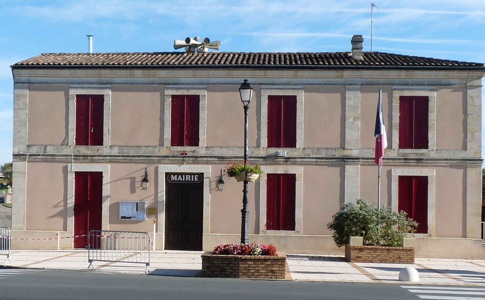 Mairie de Saint-Martin-Lacaussade, Gironde, France